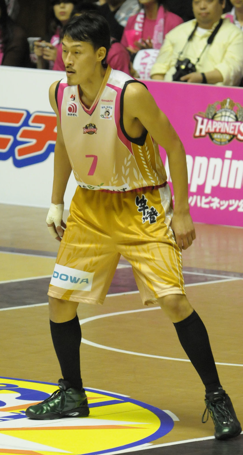 秋田ノーザンハピネッツ、佐野吉宗選手。秋田県立体育館で。